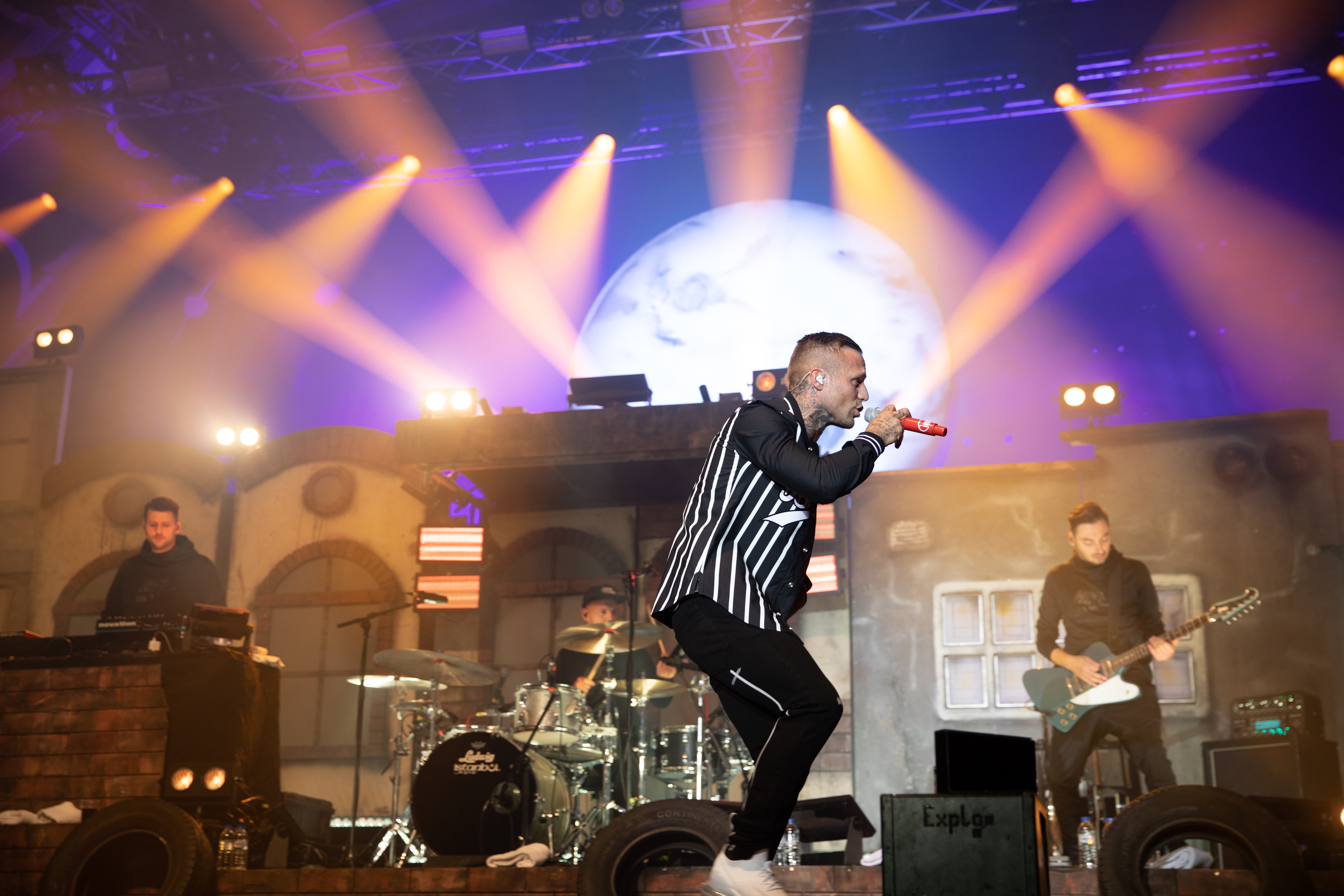 Kontra K at Fritz DeutschPoeten 2018.